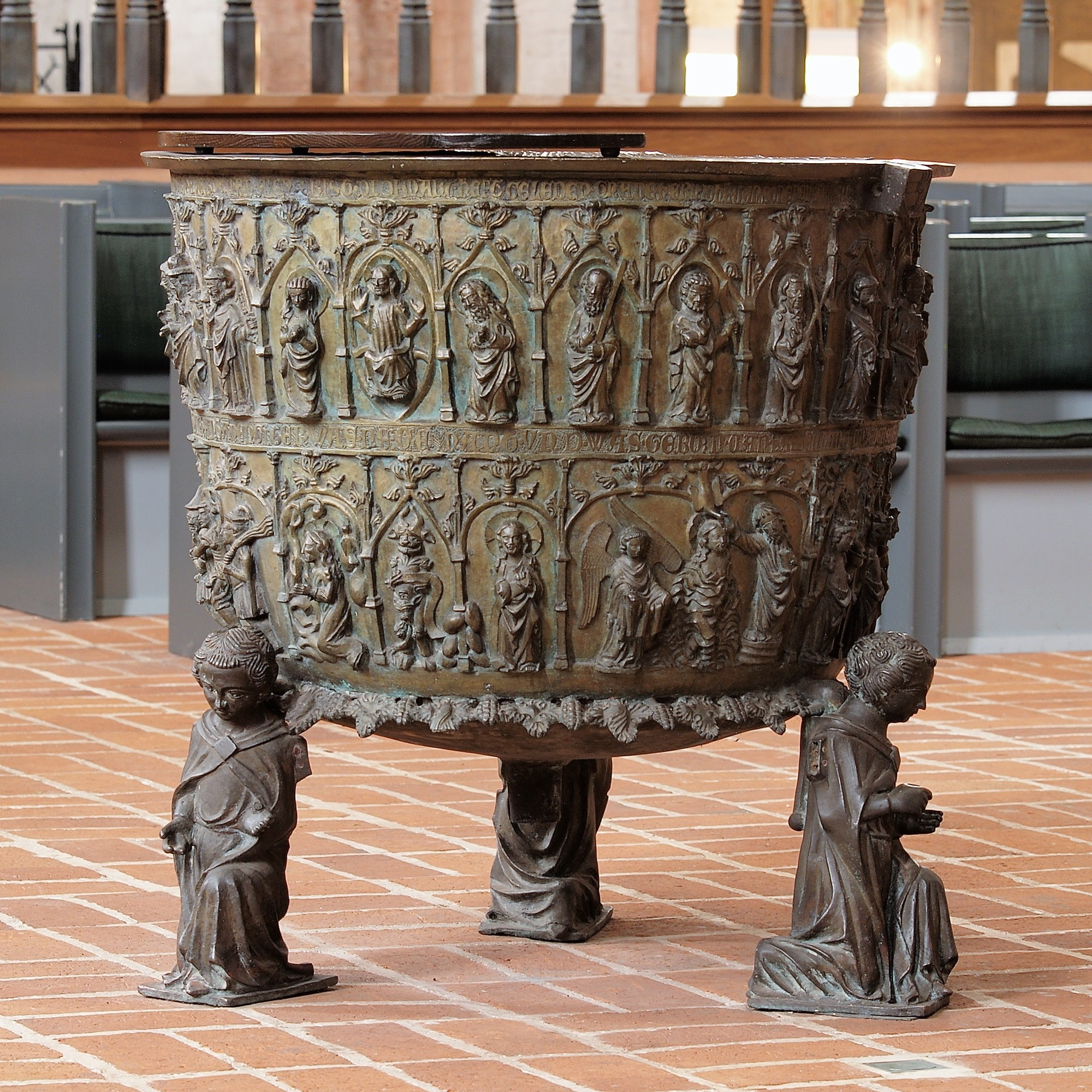 Das Taufbecken in der Marienkirche in Lübeck aus nördlicher Richtung